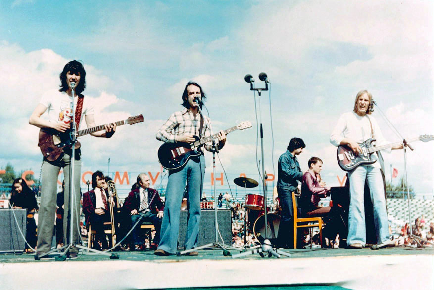 1976 год. Гастроли по стадионам с медной и струнной группой. Слева направо:А.Микоян, Ю.Фокин, С.Намин, А.Слизунов, В.Сахаров, К.Никольский.